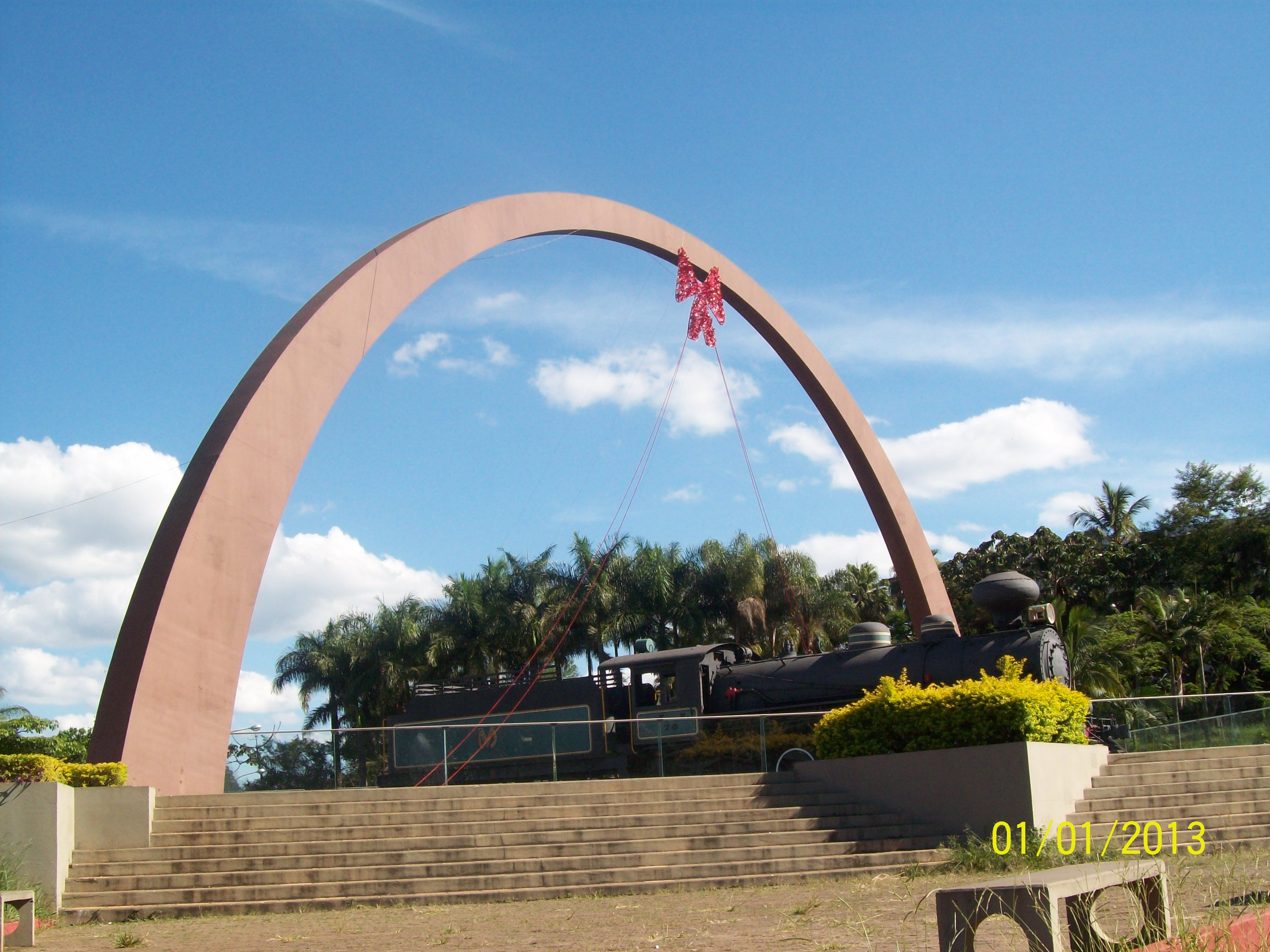 Itabira MG Brasil - Praça do Areião